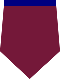 Patka piechoty używana w latach 1952-1960